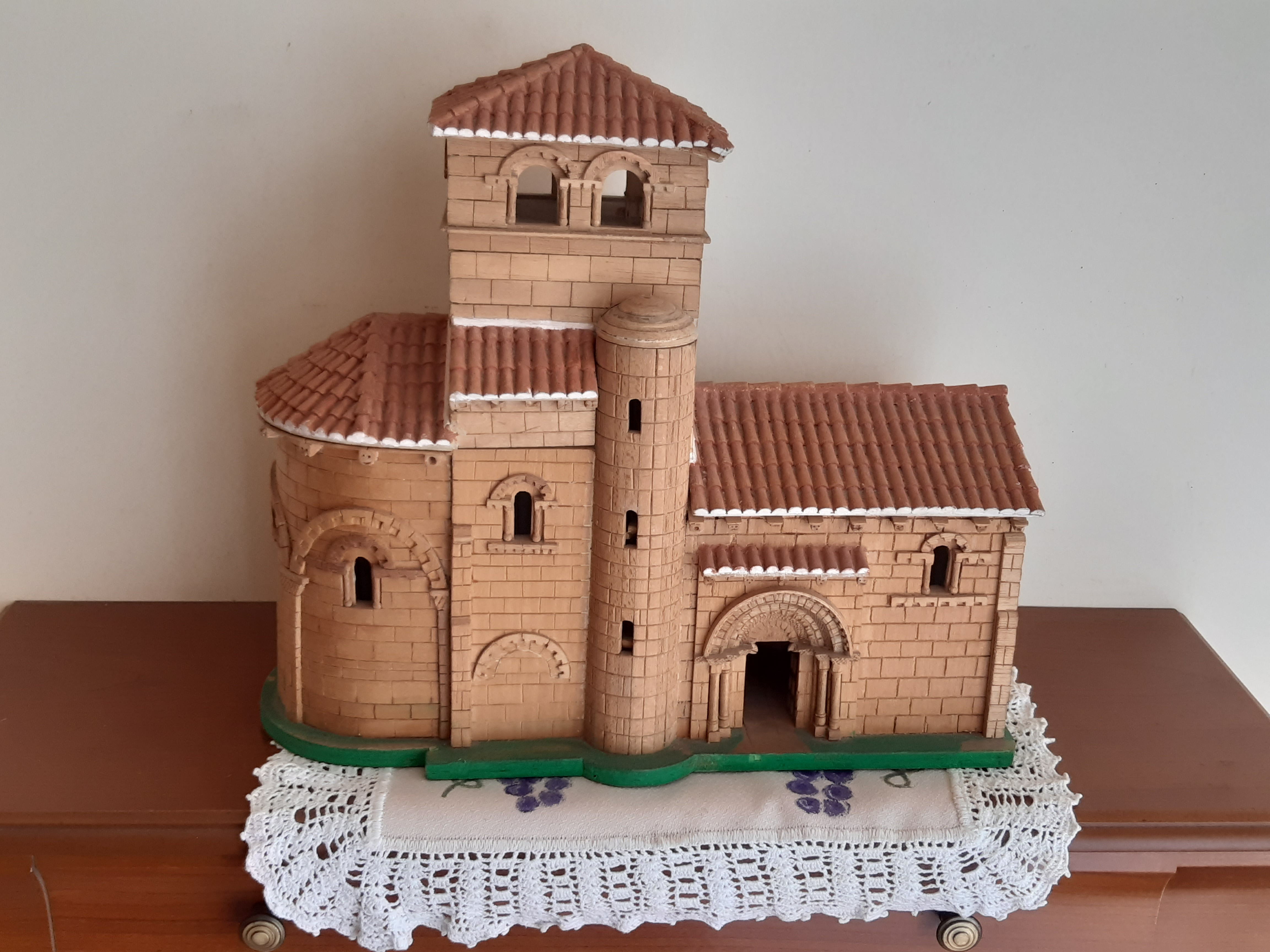 Representa una maqueta de la ermita de Nuestra Señora del Valle. La ermita es una importante basílica de Monasterio de Rodilla, pueblo de la comarca de La Bureba (Burgos). Se enmarca en el siglo X, es de estilo románico y de gran interés para los historiadores de arte. El templo se asienta en un hermoso paisaje que permite ver el arte románico con armonía y belleza. Cerca de ella, se encuentra el Castillo de Monasterio de Rodilla, así como uno de los dos principales barrios que componen el pueblo. Se cree que está construida sobre las ruinas de otro templo